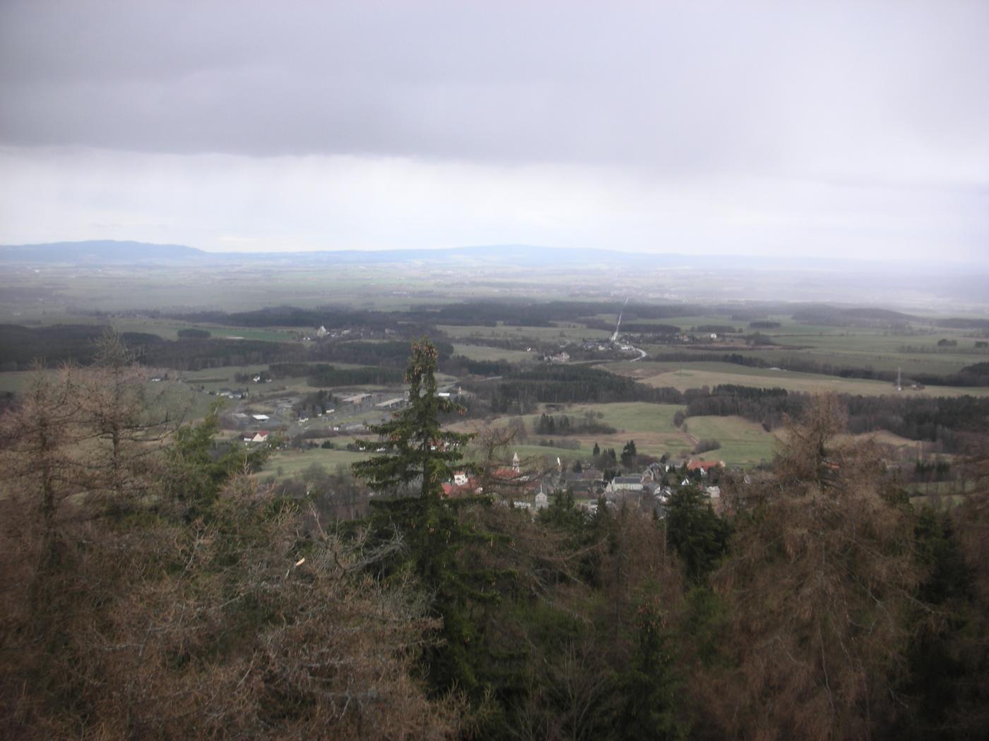 Ausblick vom Kapellenbergturm in Richtung Egerland, am Horizont das Kaisergebirge